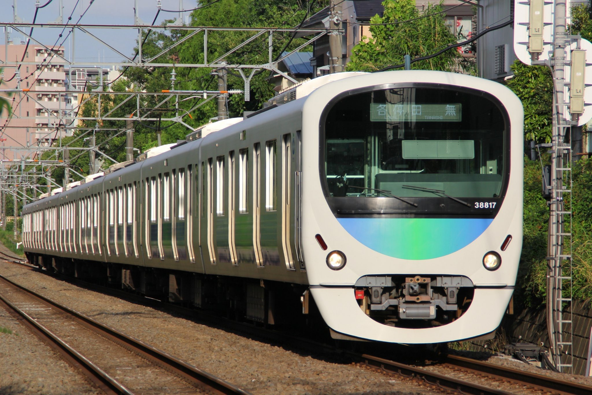 西武30000系38117編成 各停田無行き